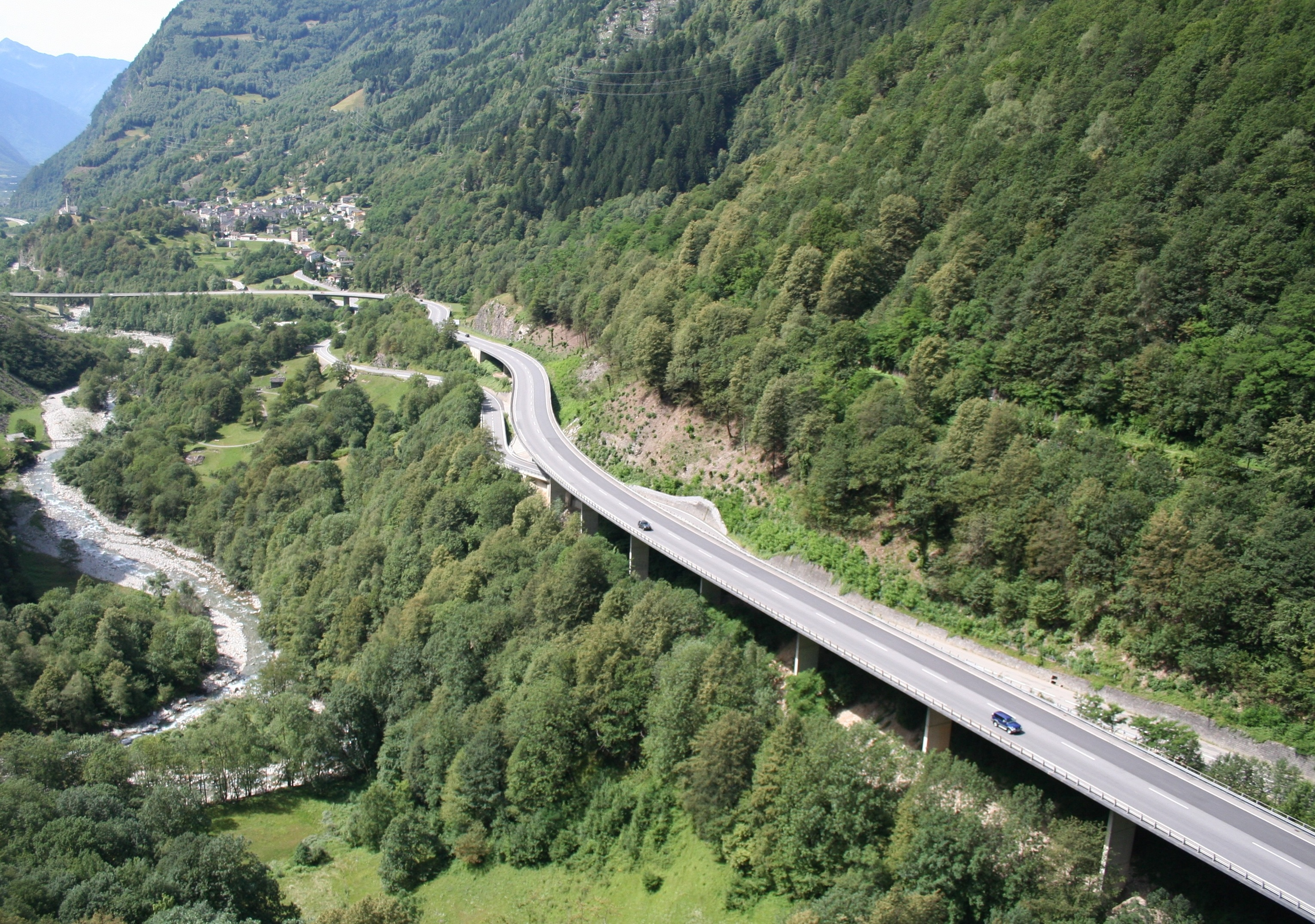 A 13 unterhalb Mesocco